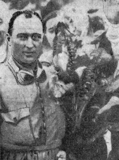 Luigi Fagioli, vainqueur du GP de Monaco 1935.